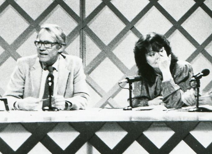 Lennart Swahn och Anna Sundqvist 1986 i programmer "Babbel"